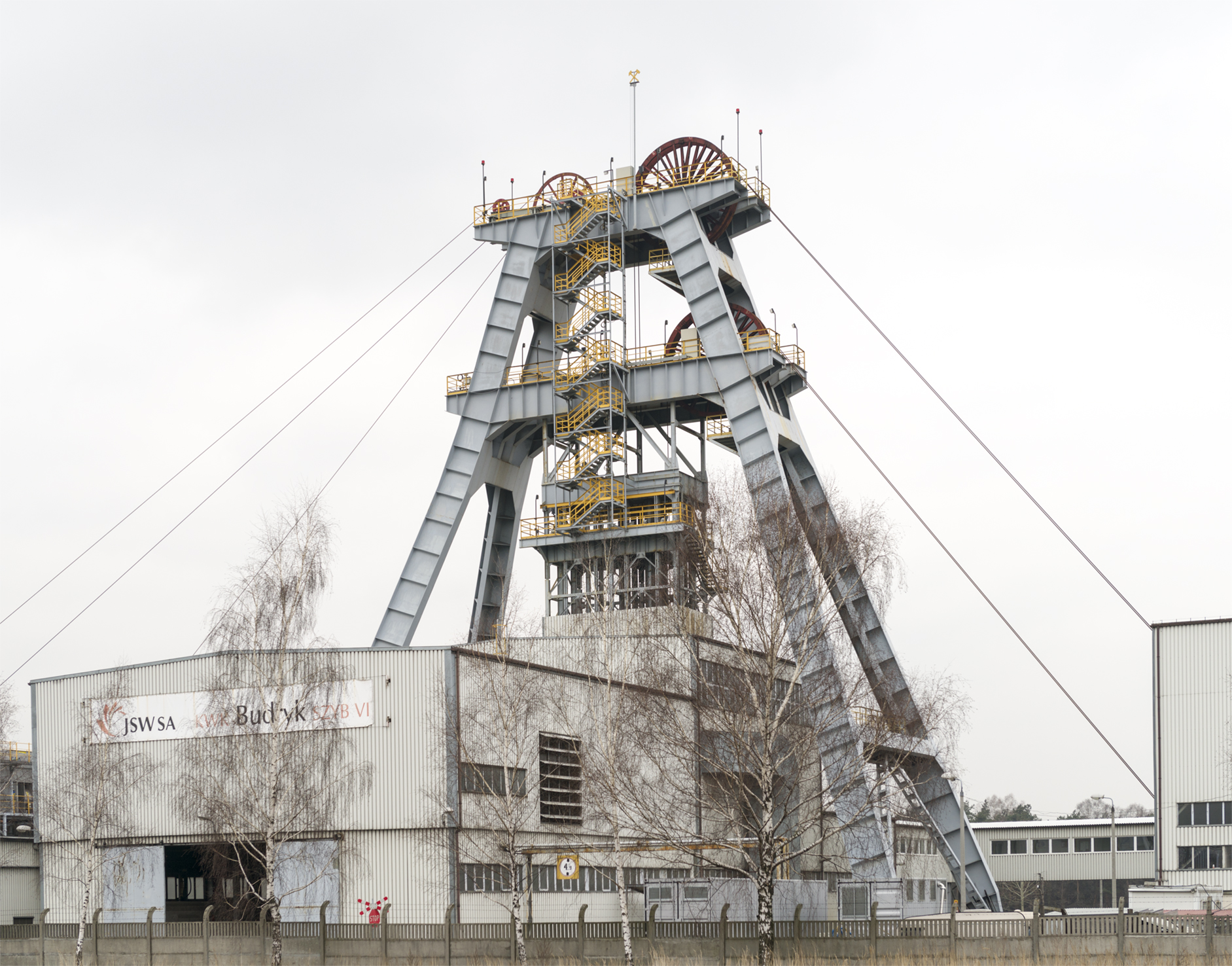 Materialschacht VI (Chudów) des Bergwerks Budryk